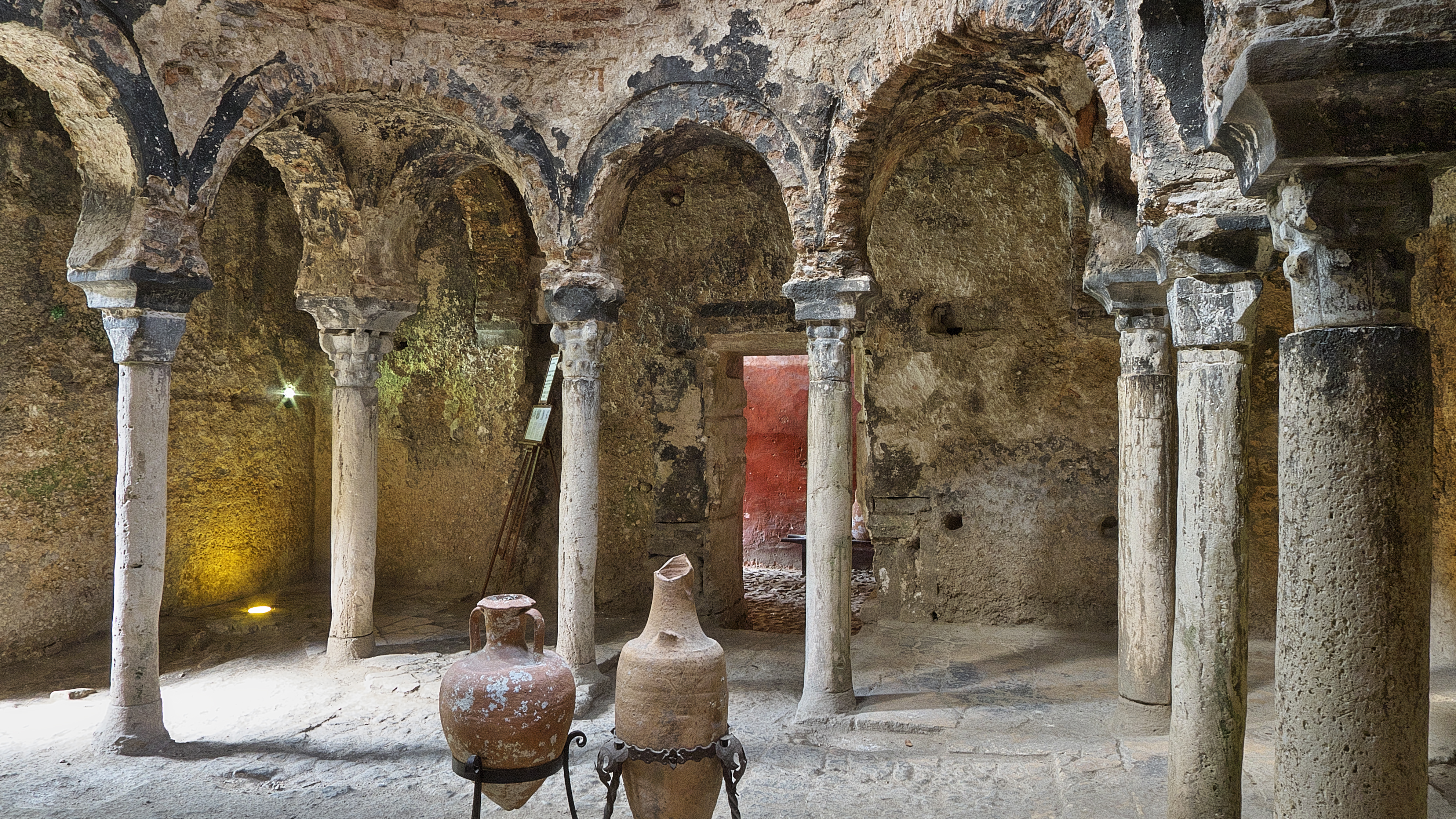 El mejor testigo, hasta hoy, de la Madina Mayurqa (s. X). Lo que nos queda es la sala destinada a los baños de vapor, que forma un cuadrado de 7,20 m.